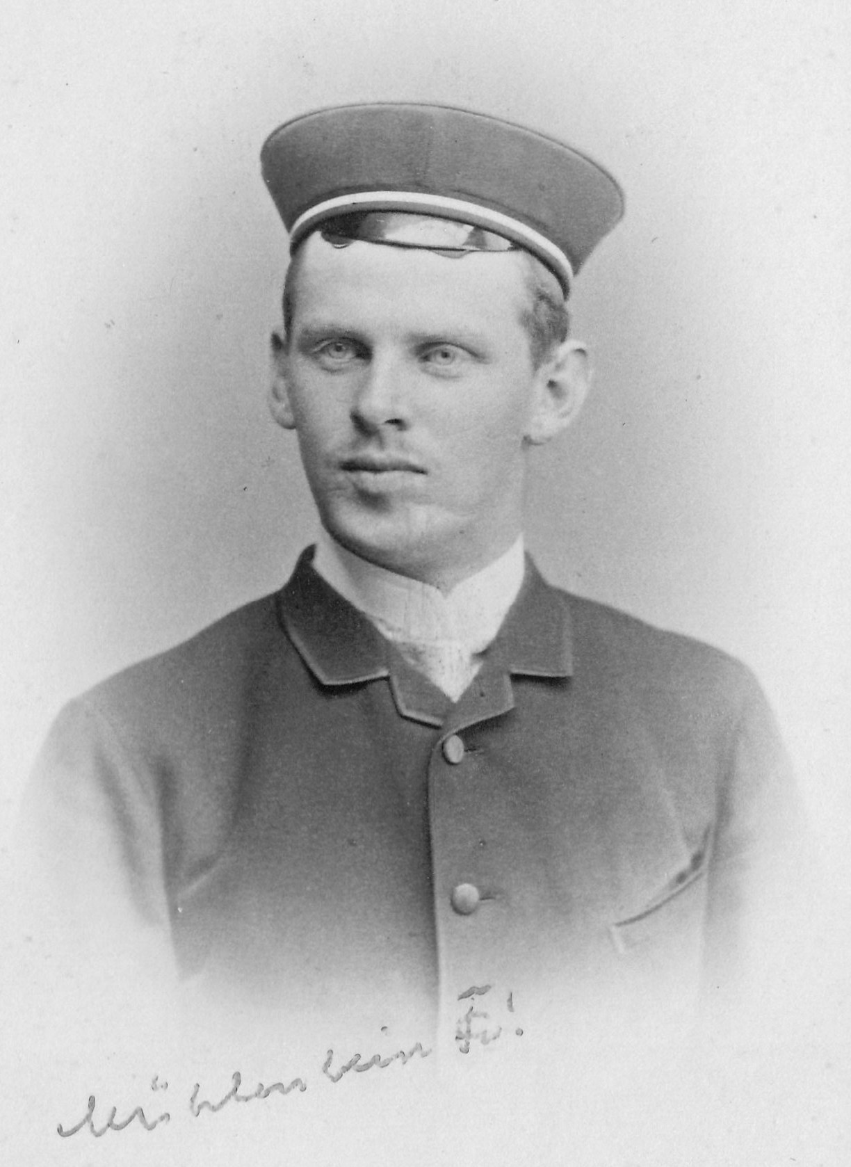 Porträtfotogafie von Philipp Mühlenbein (1865–1951)